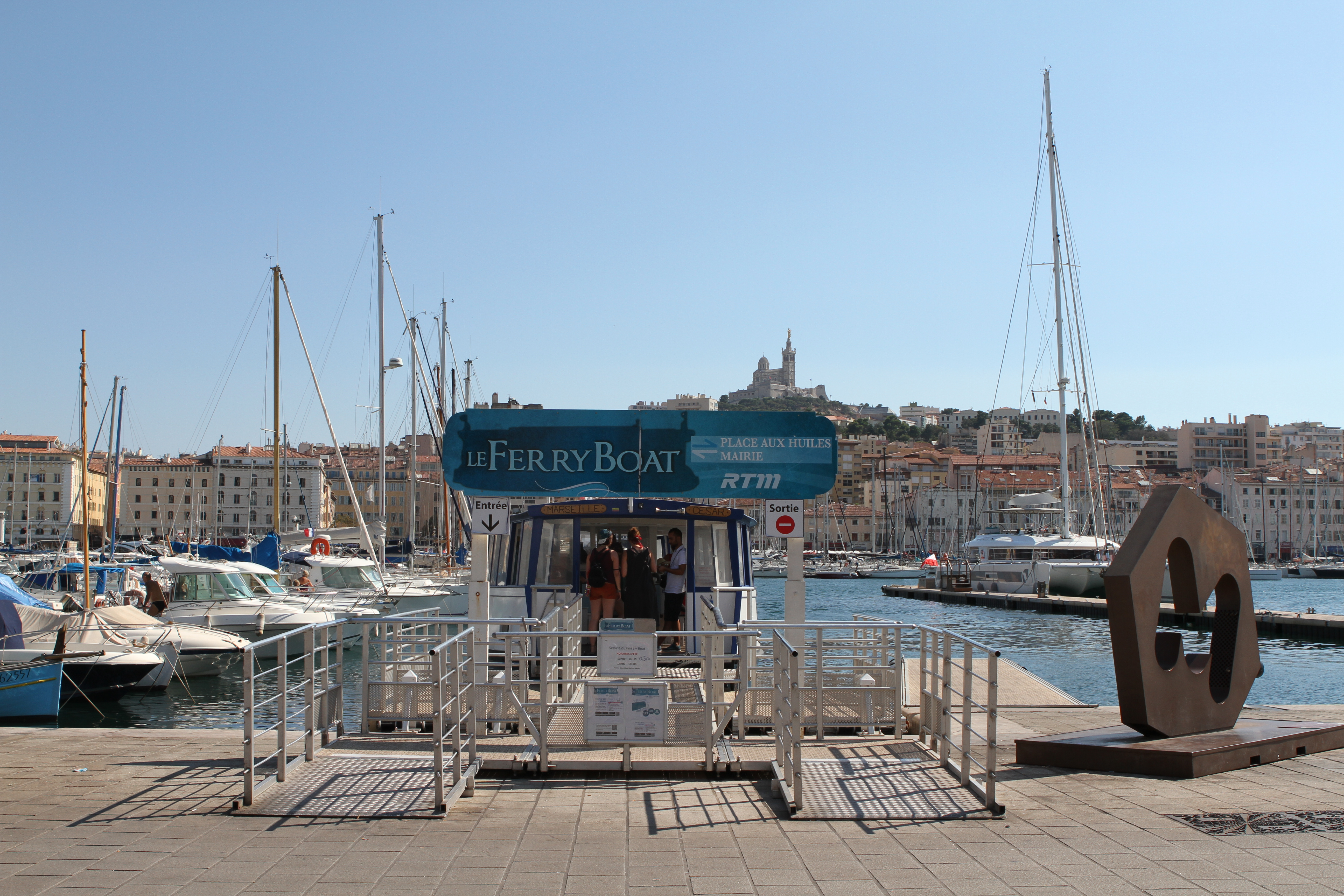 L'appontement pour le ferry boat, dans le Vieux-Port de Marseille (France)